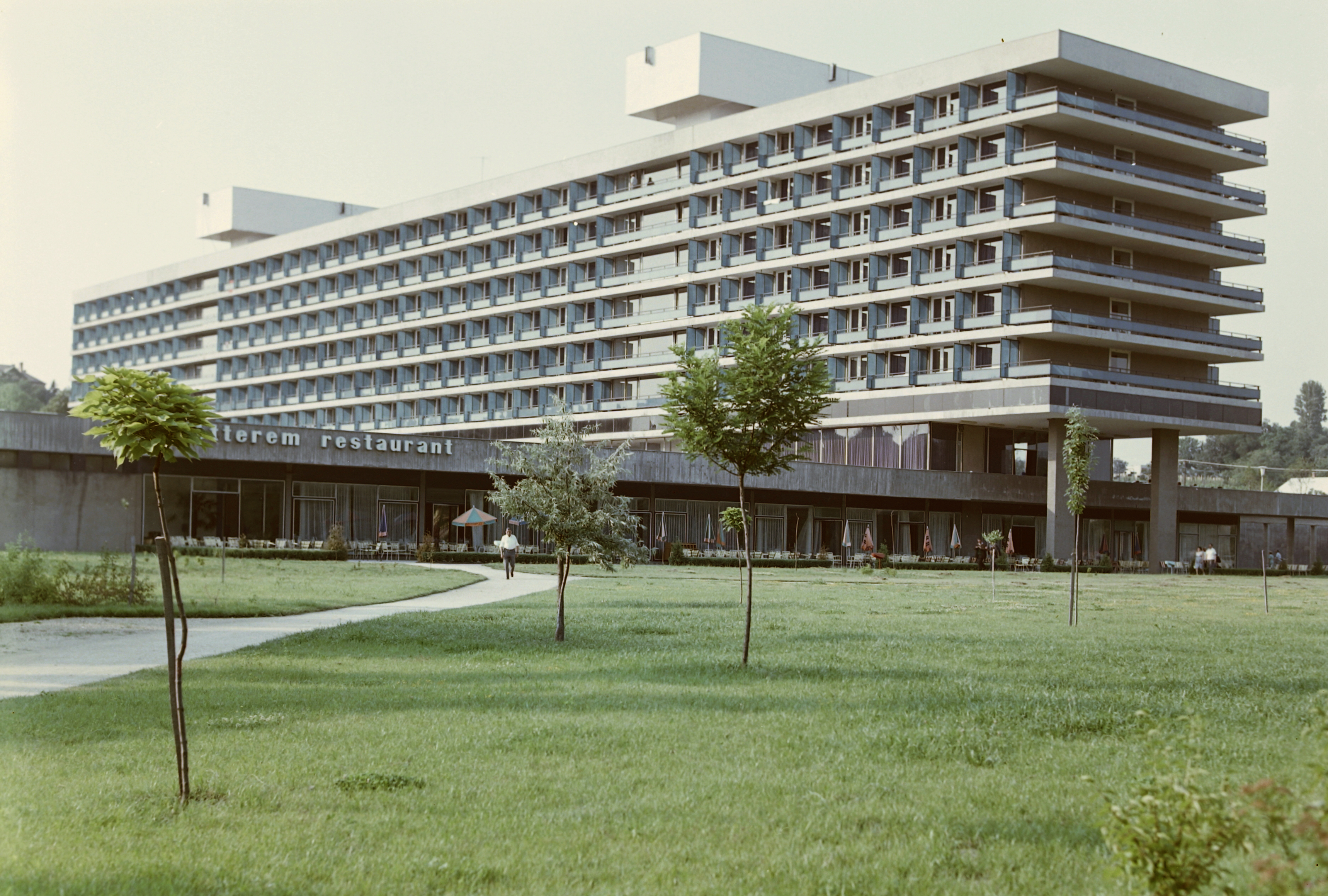 Hotel Annabella a Tagore sétány felől. Location: Hungary, Balatonfüred Tags: hotel, colorful Title: Hotel Annabella a Tagore sétány felől.